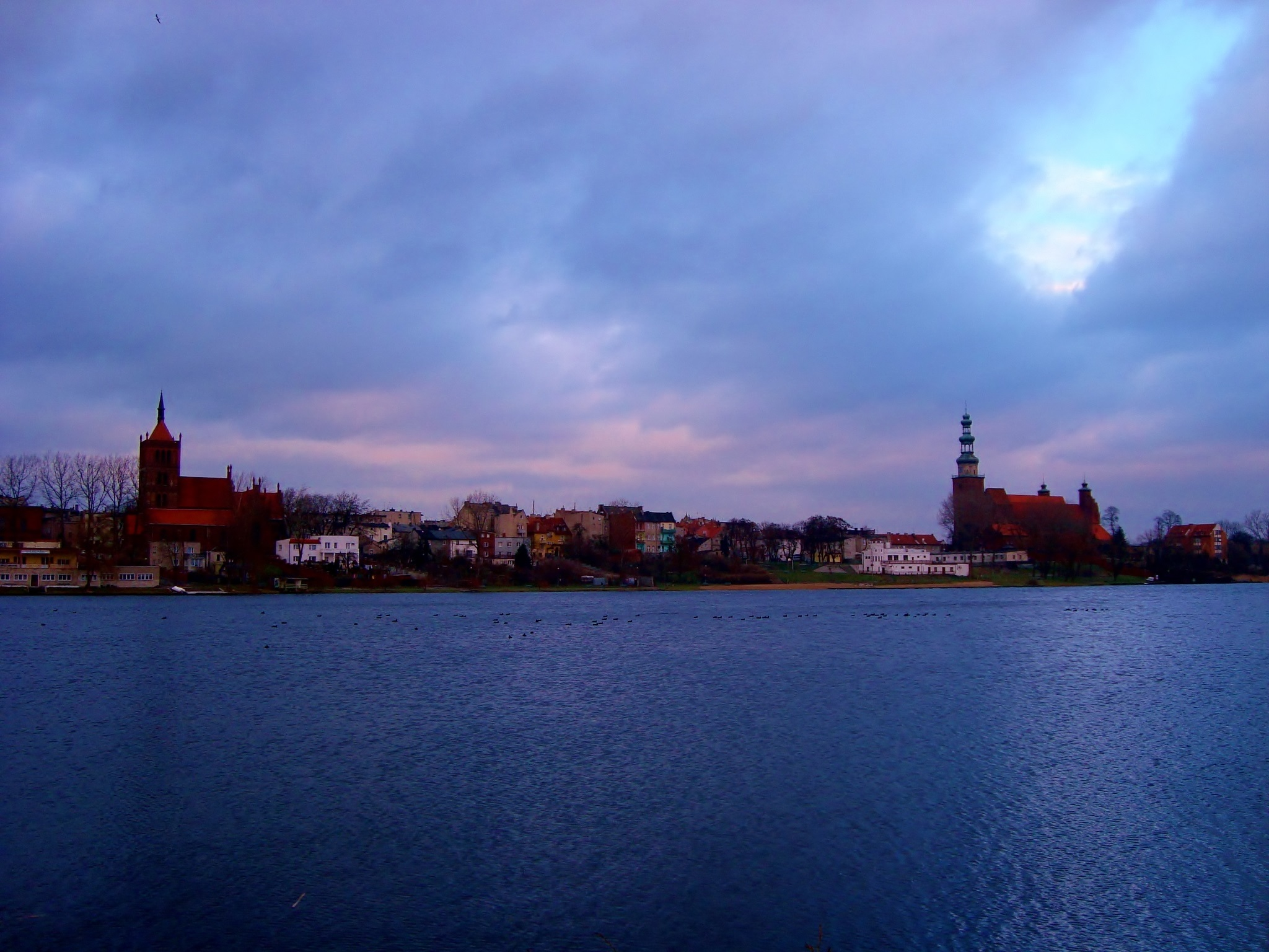 Panorama Chełmża